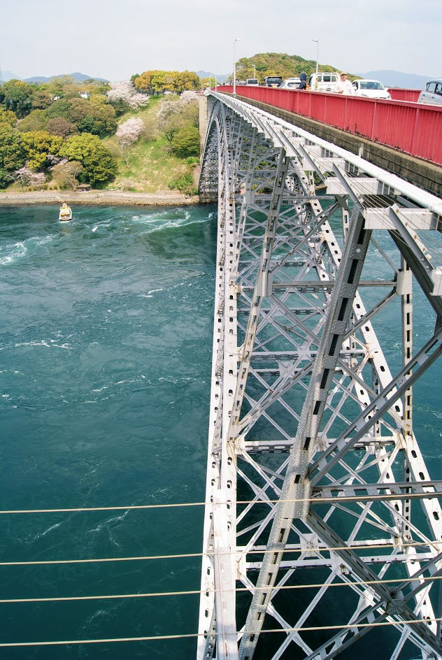 西海橋のアーチ部分。